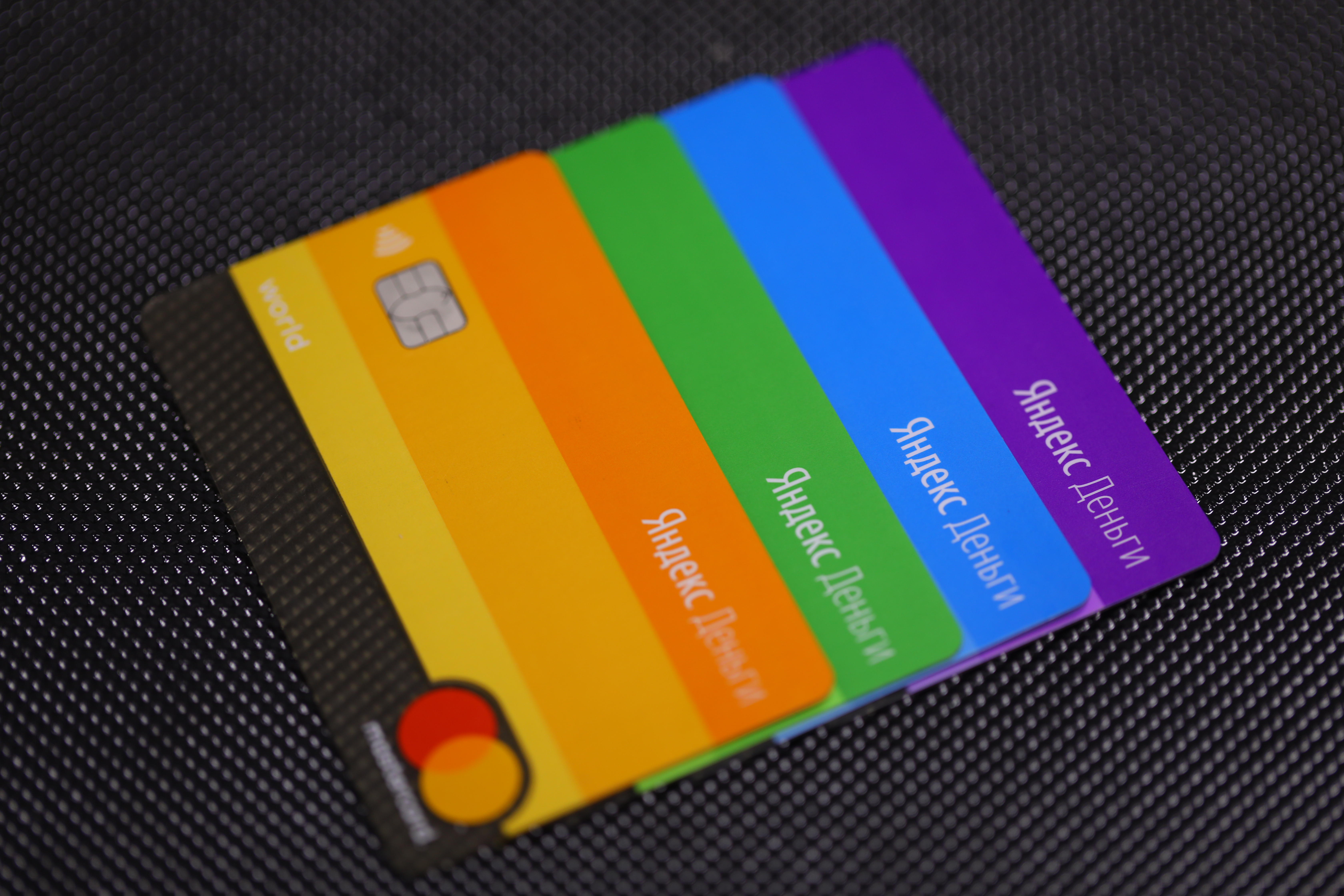 Цветные дебетовые карты «Яндекс.Денег»